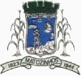 Brasão do município de Matozidos, Minas Gerais, Brasil